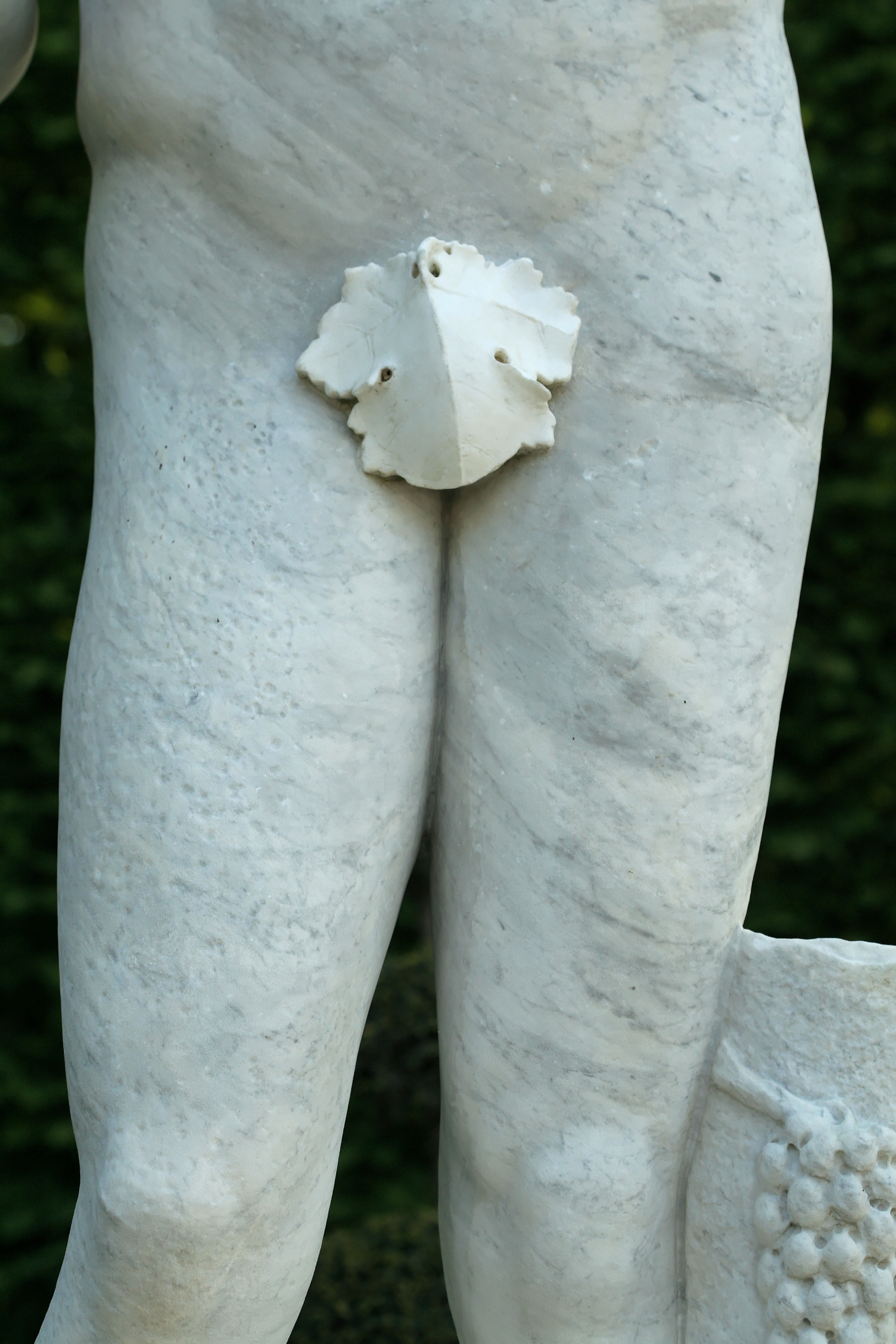 Parc de Versailles, demi-lune du bassin du Char-d'Apollon. Bacchus, antique installé en 1795 (était auparavant à Marly). Restauré en 1853 par Jean Duseigneur.